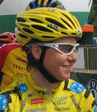 Magdalena Sadłecka - Skoda Auto GP, Gdynia, Poland 2005 Author: Piotr Tysarczyk